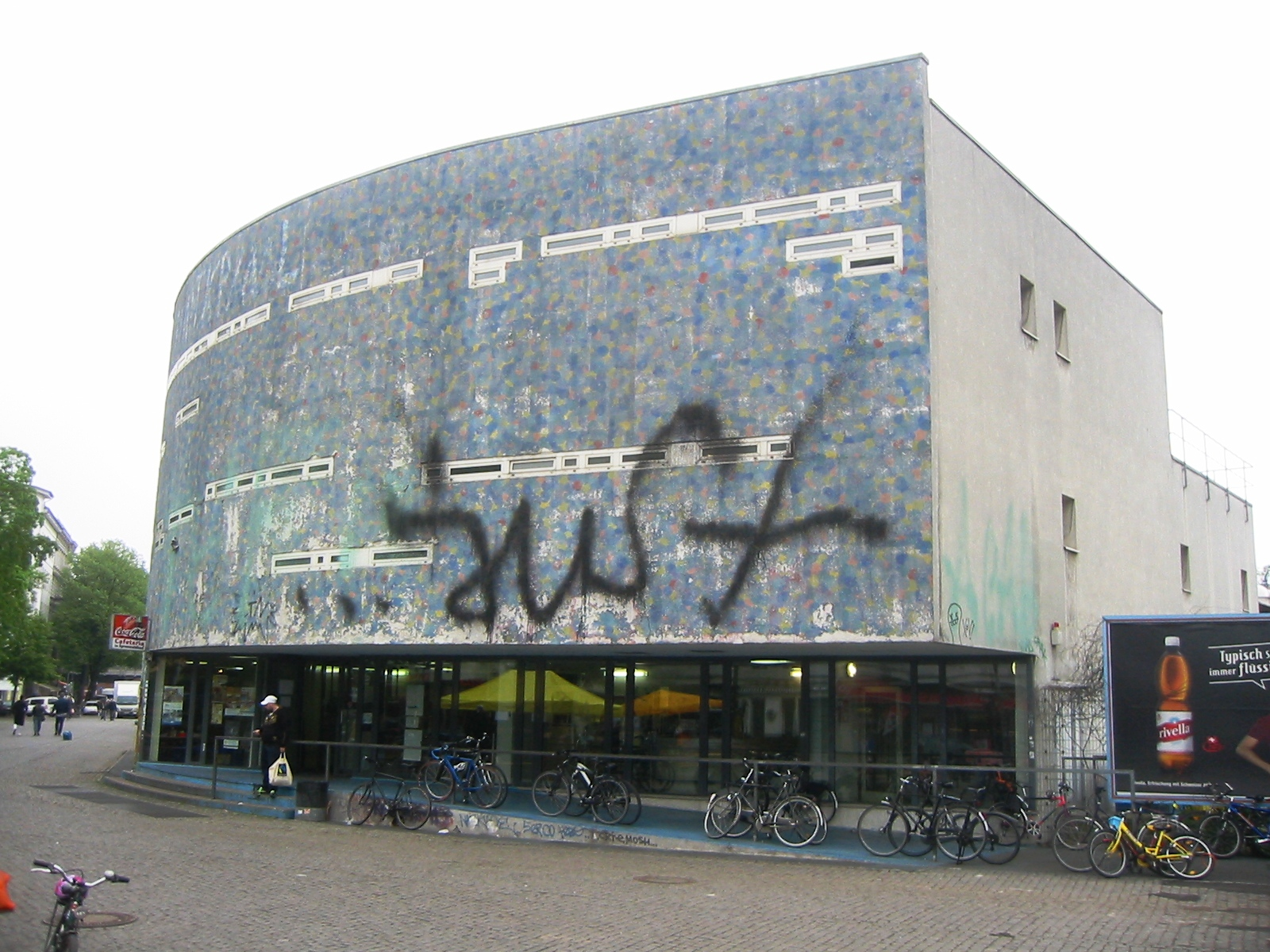 Eingang zum Bad am Spreewaldplatz in Berlin-Kreuzberg